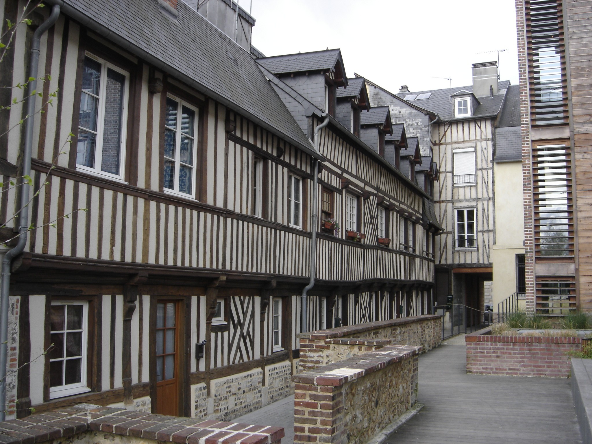 Impasse Alfred Canel à Pont-Audemer (Eure, France)